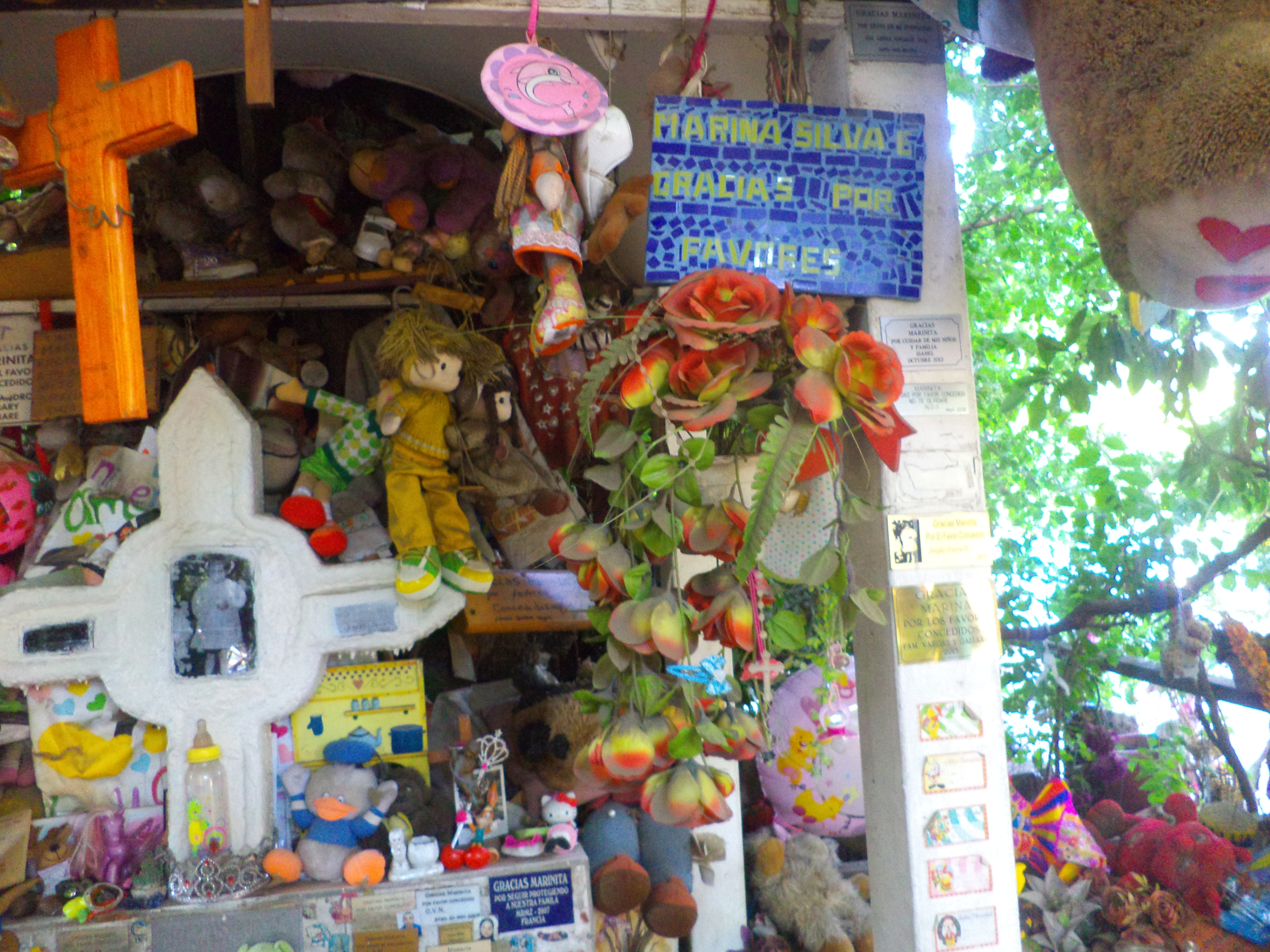 Animita o santuario para la niña Marina Silva Espinoza, asesinada bajo un àrbol del Parque O´Higgins en Santiago de Chile. Lugar de peregrinación.